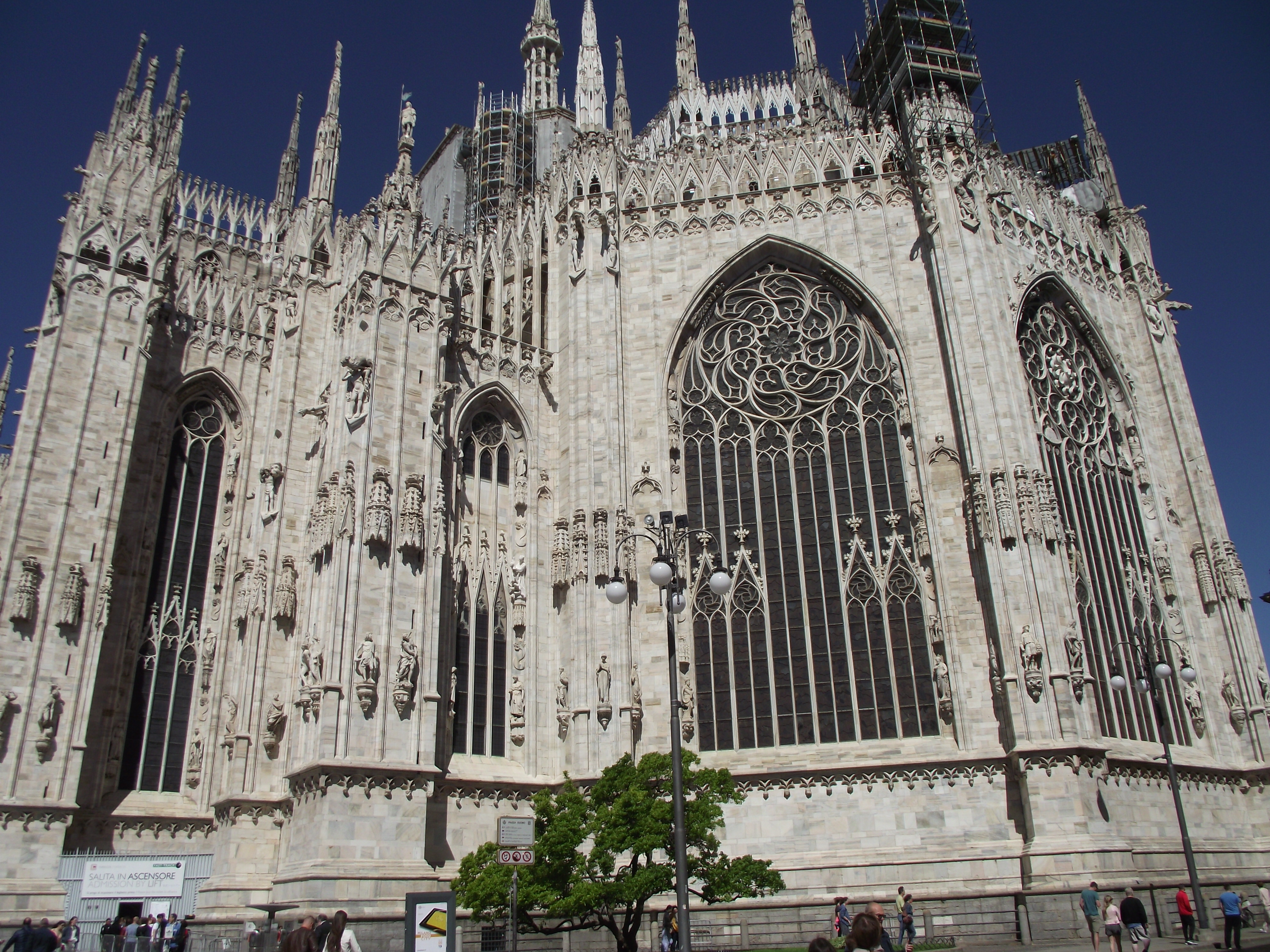 Abside